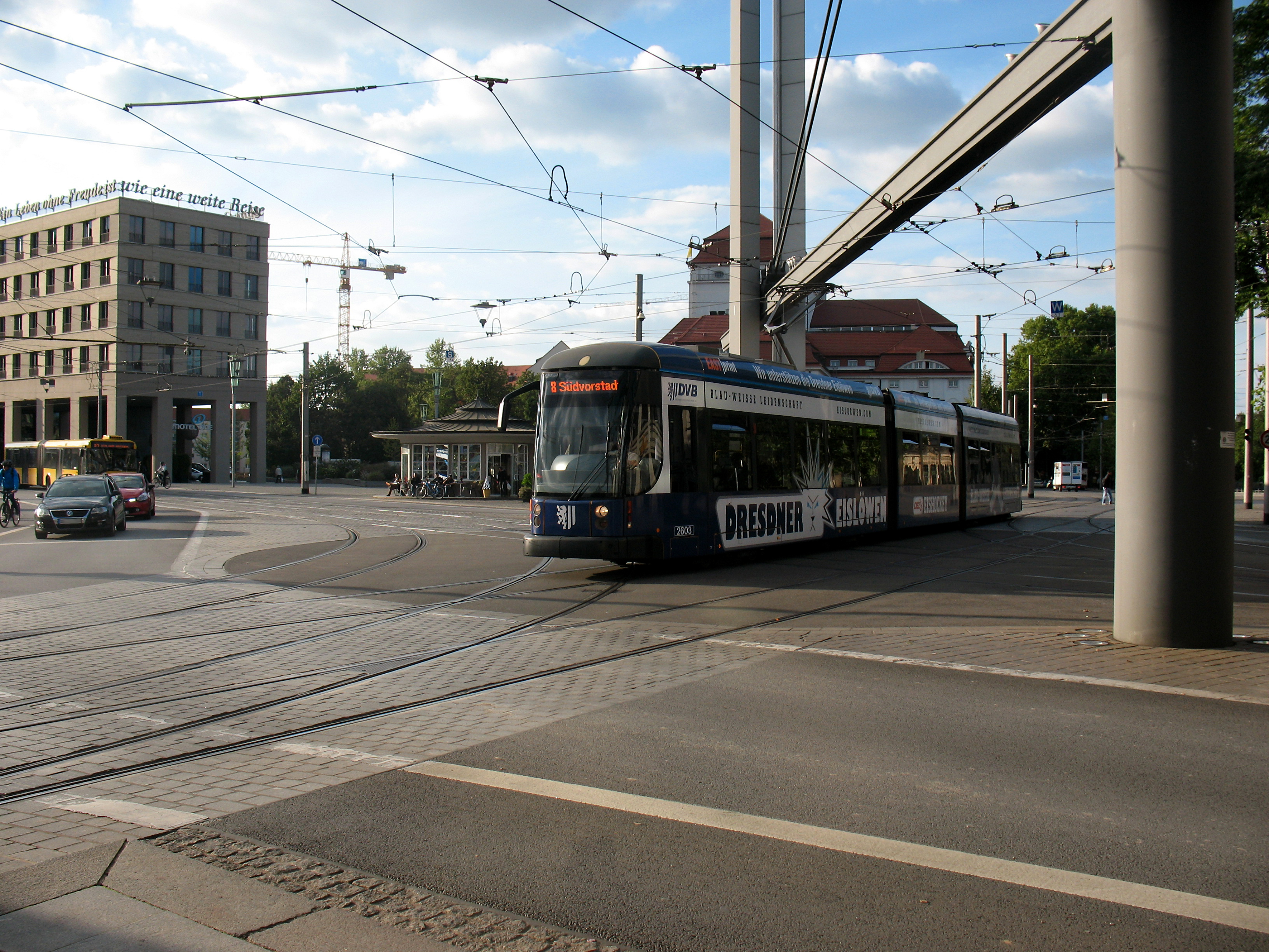 + 00000000024_Image_Postplatz_Dresden_Germany